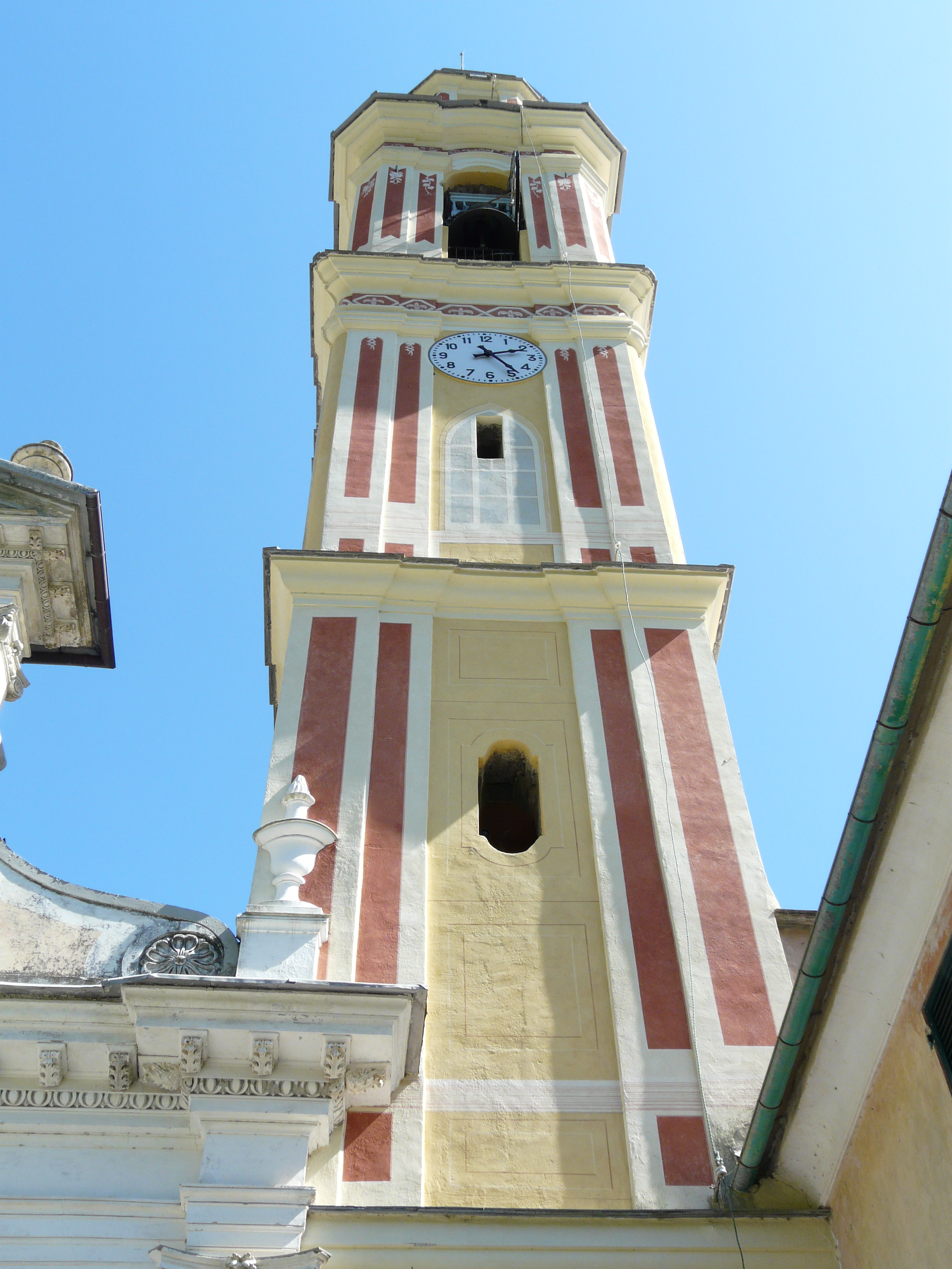 Chiesa di Santo Stefano, Cichero, San Colombano Certenoli, Liguria, Italia